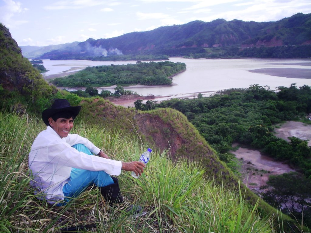 Tipico poblador pilluanino, en la cima del Morro Cachipampa, en la periferia de Pilluana